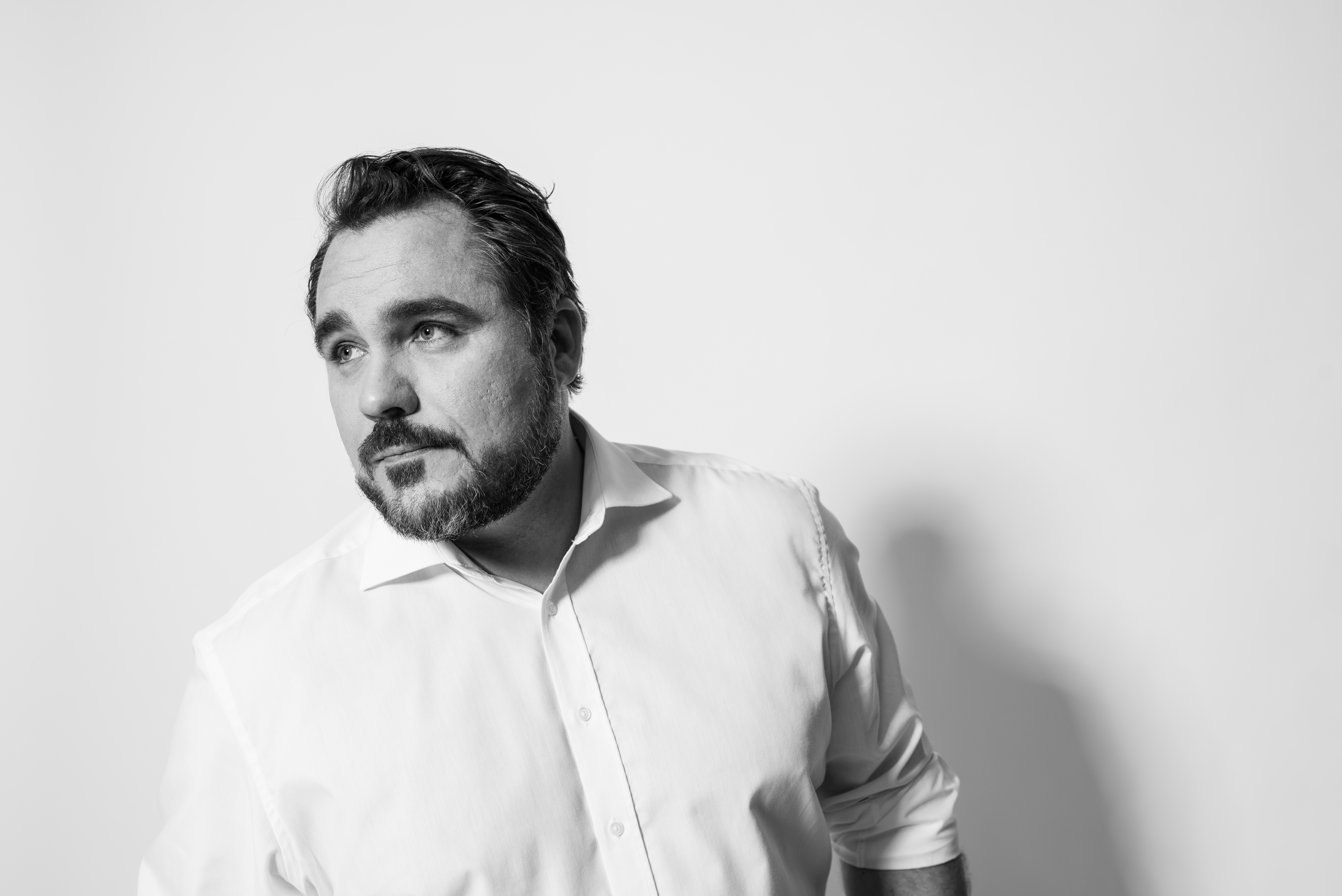 Daniel Föst, Bundestagsabgeordneter der FDP, Generalsekretär der FDP Bayern.